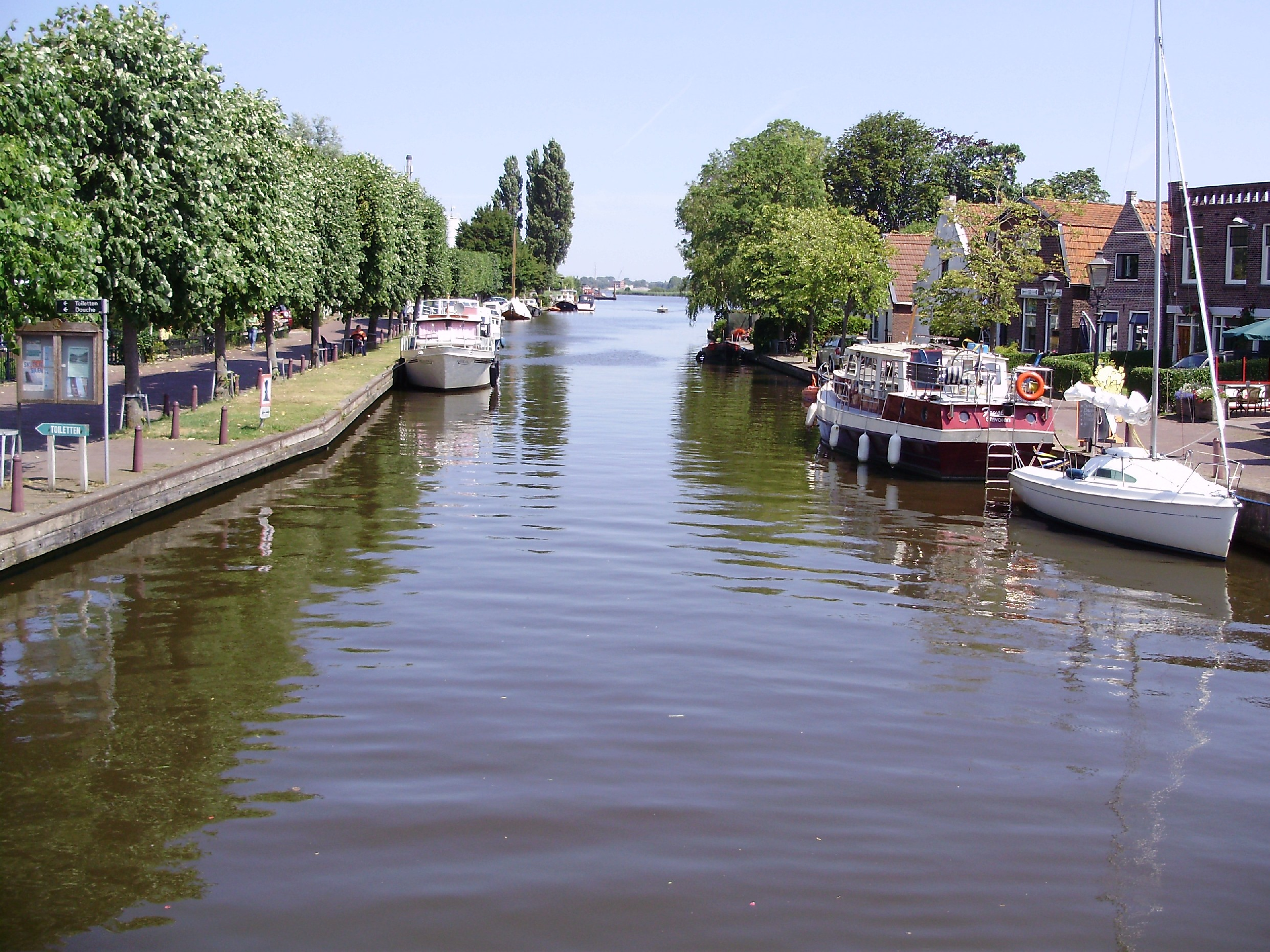 De Geeuw in IJlst, gemeente Súdwest Fryslân